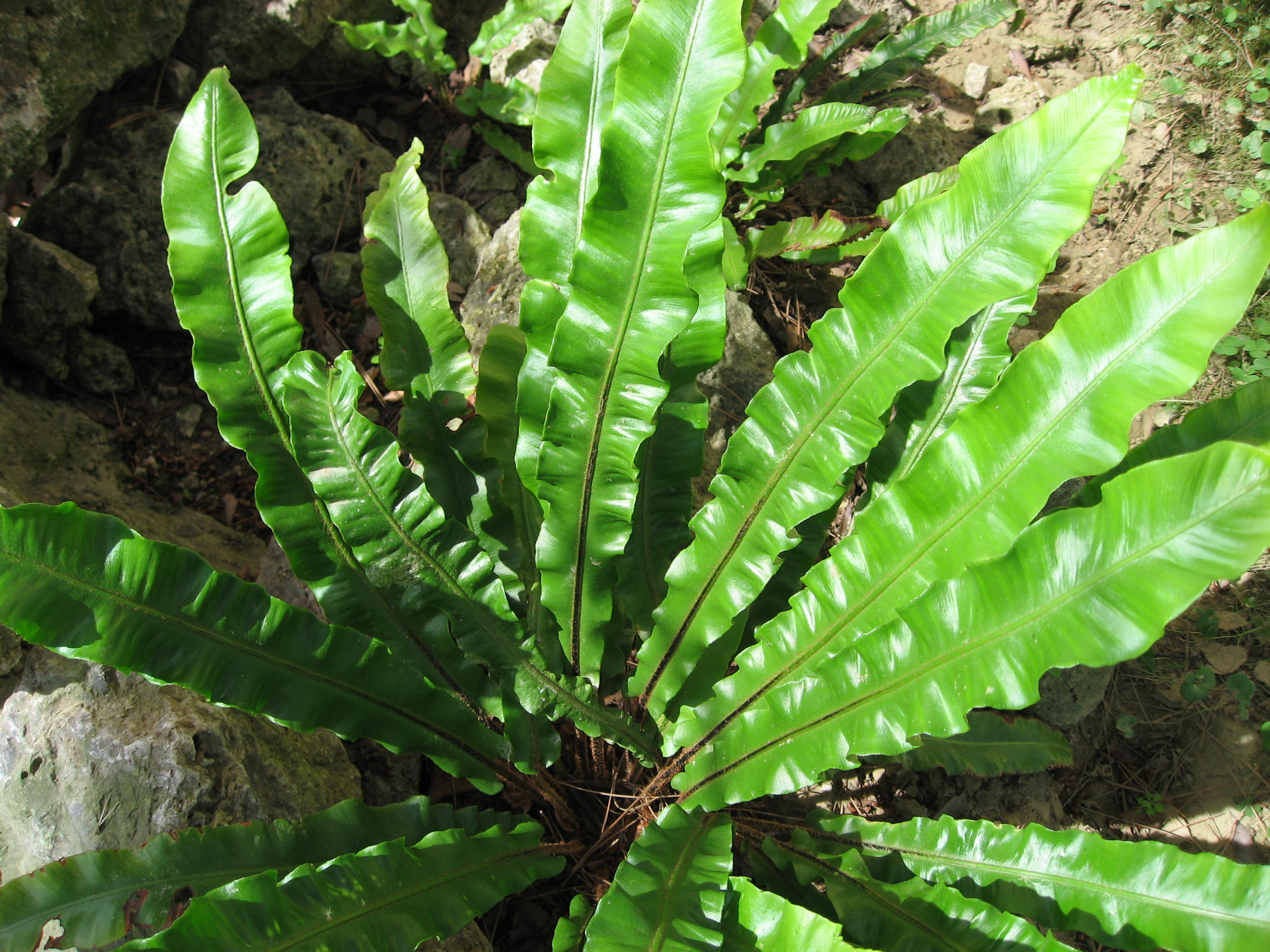 Phyllitis scolopendrium subsp. scolopendrium in Giardino dei Semplici di Firenze Map: 43° 46' 45" N 11° 15' 39" E